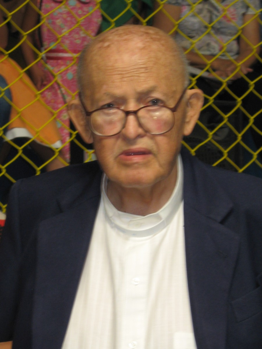 Bishop Emeritus of Irecê (Bahia) D. Homero Meira (Caetité, durante a sagração do Diácono Eutrópio Aécio de Carvalho).